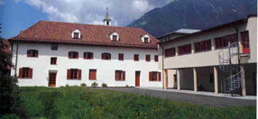 Außenansicht der Bibliothek nach dem Neubau 1994.